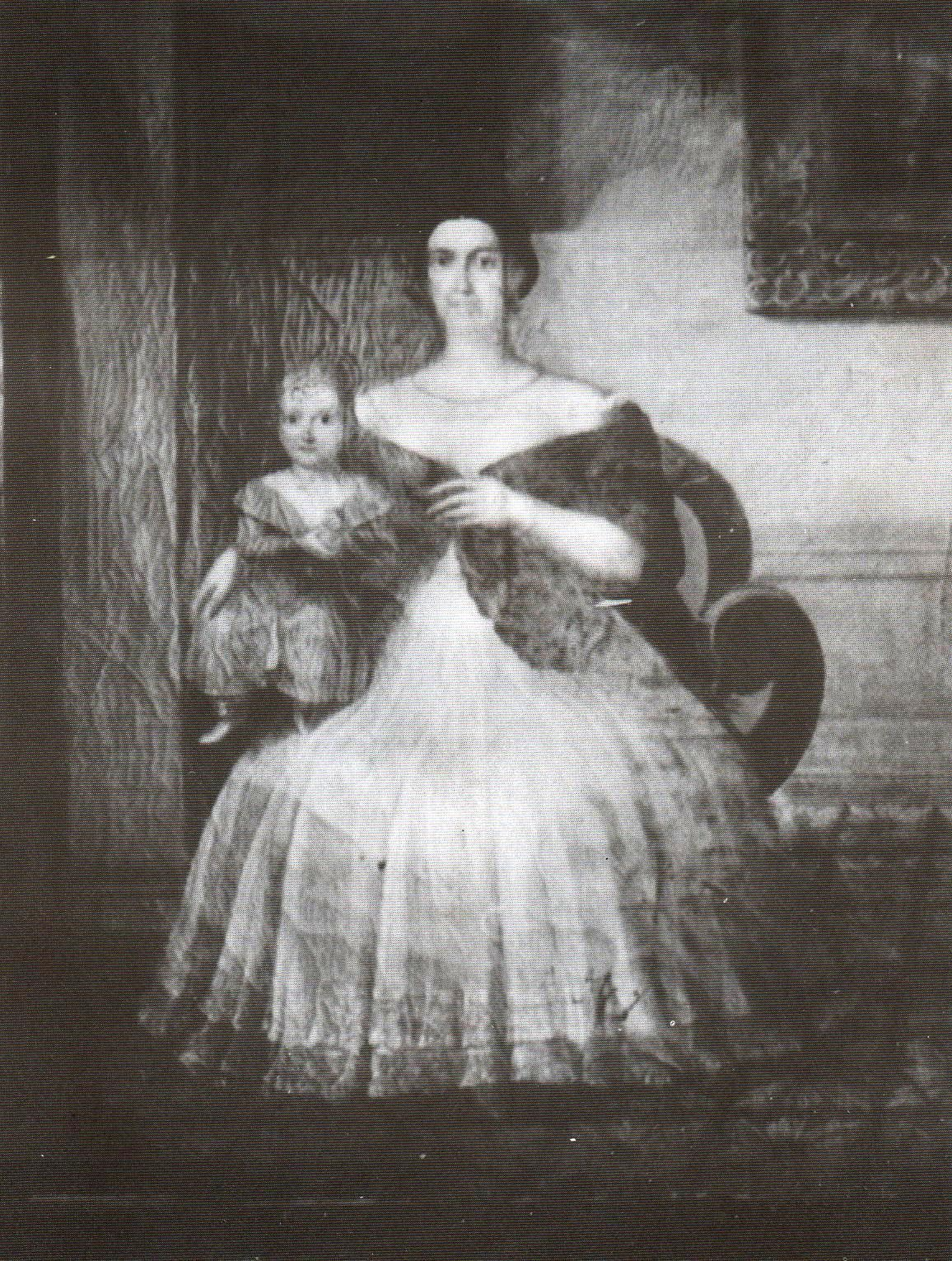 Retrato de María de la Vega Nates (esposa de Juan de Salinas) y su segunda hija, María del Carmen Salinas de la Vega. Óleo sobre lienzo, Antonio Salas (1811).